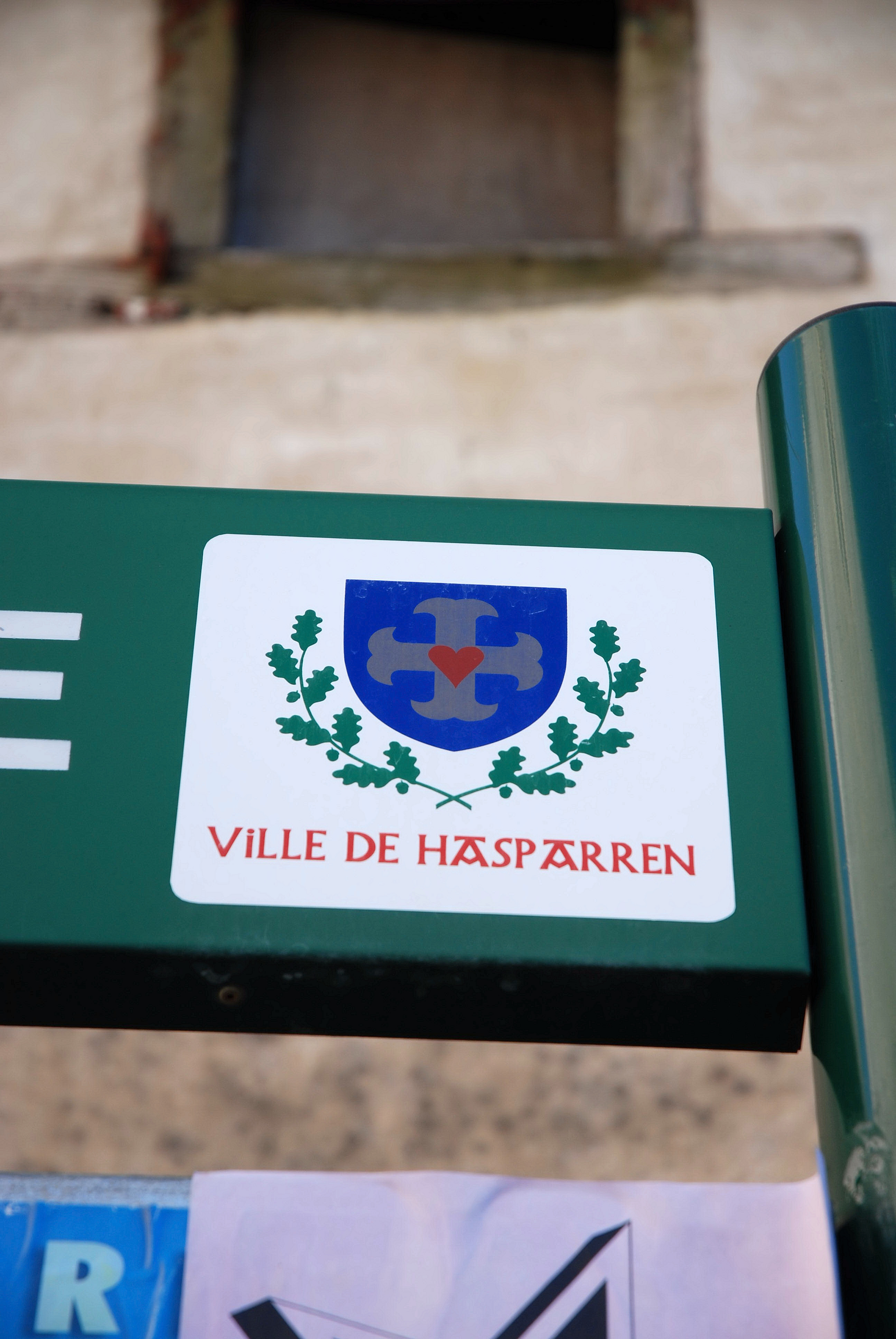 Hasparren, le blason. Photo prise le 31/12/06 par Harrieta171